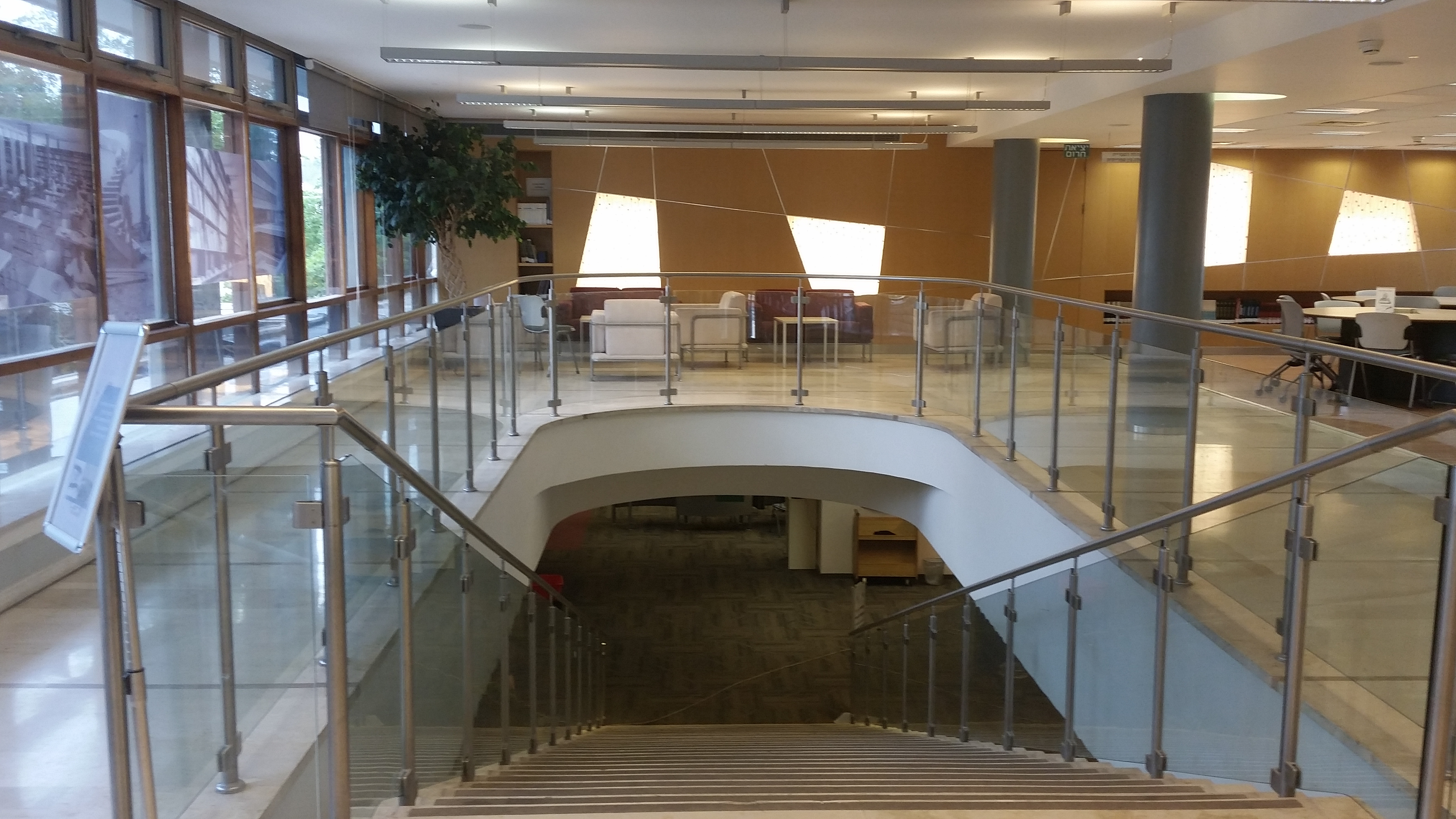 ספריית הרמן קומת כניסה